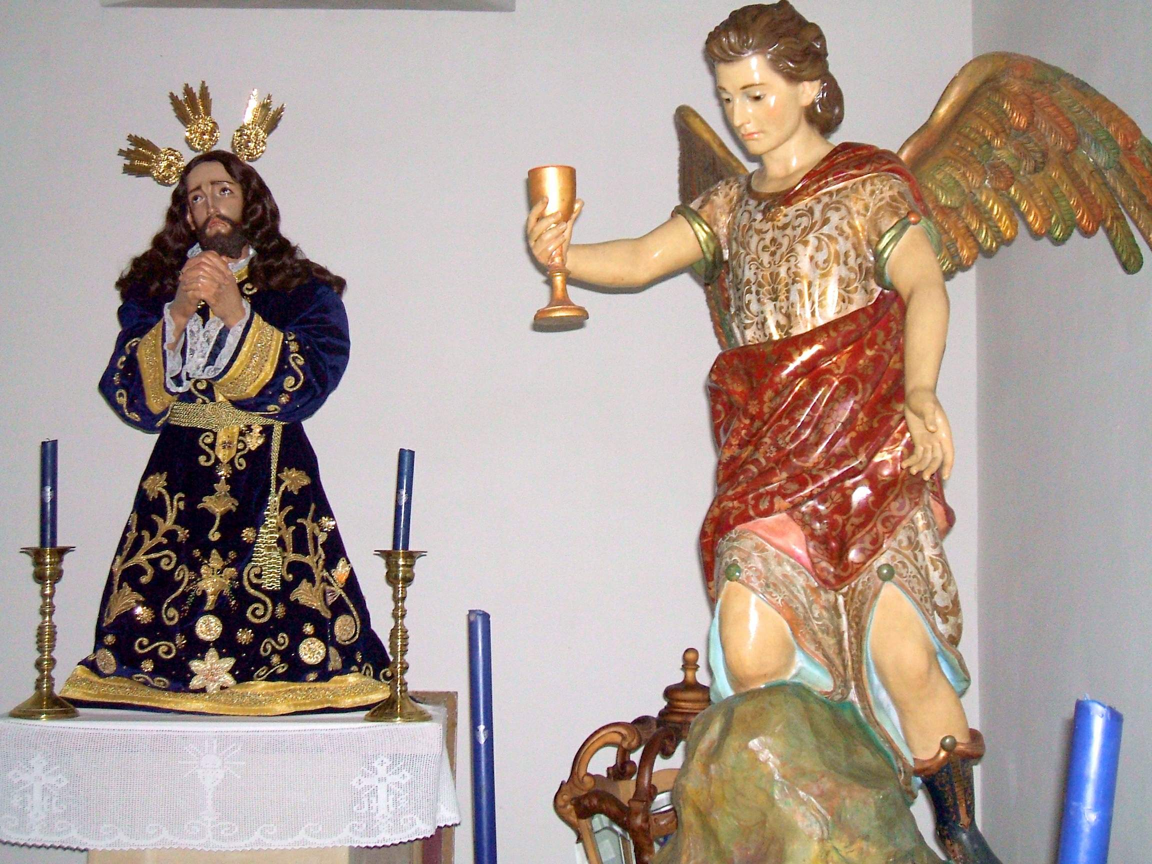 Iglesia San Andres (Baeza)